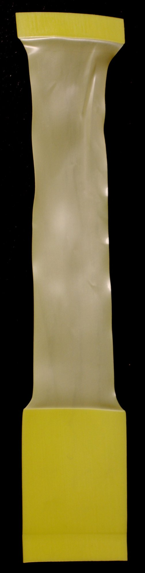 Un campione di polietilene (MDPE) che ha subito deformazione sottoposto a tensione.